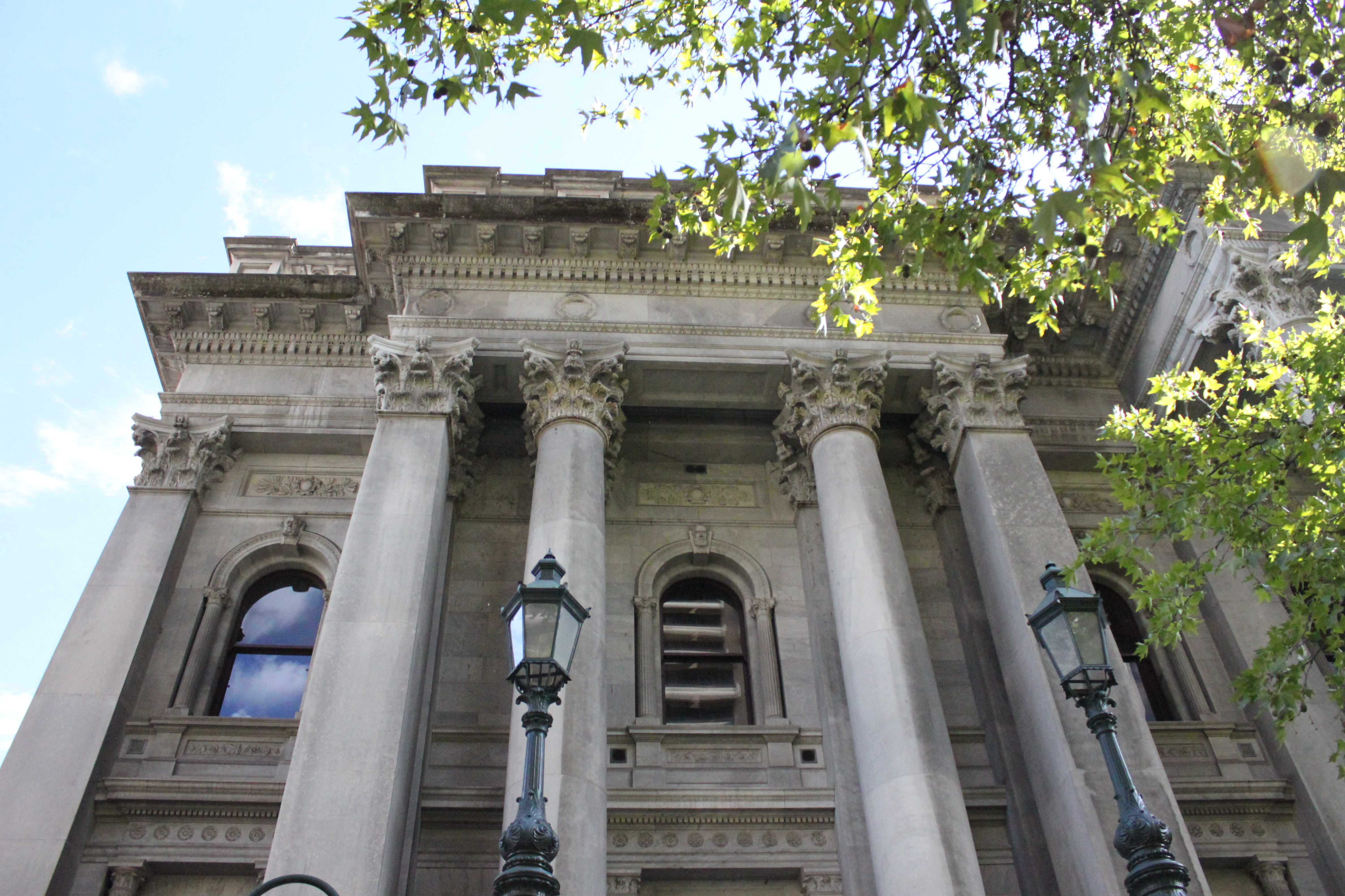 Parliament House, Adelaide.